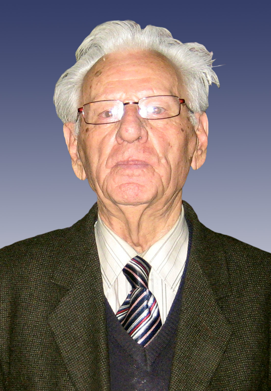 Foto e Akademik Idriz Ajetit